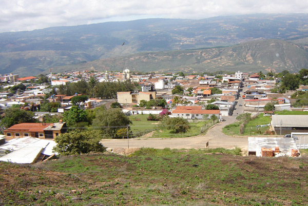 vistas de la ciudad de Michelena Municipio Michelena estado Táchira Venezuela